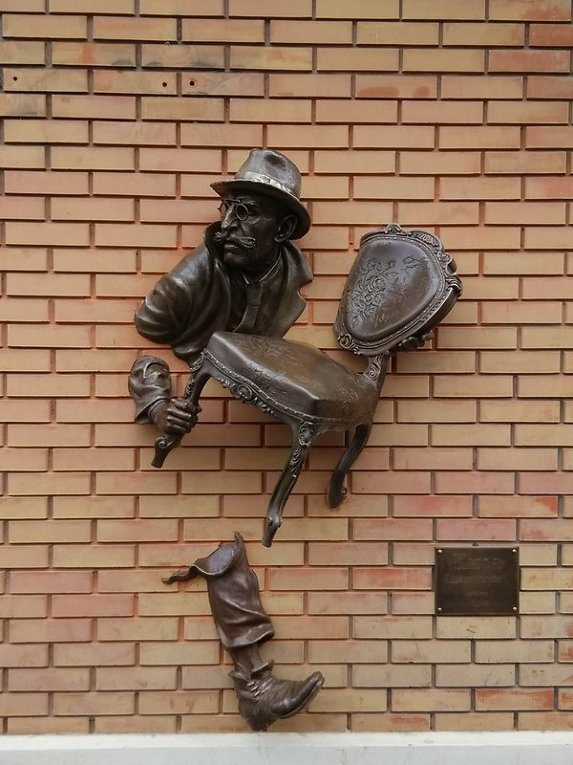 Скульптура героя роману «Дванадцять стільців» Кіси Вороб'янінова на вулиці Ярослава Мудрого в Харкові. Автор скульптури — заслужений художник України Катіб Мамедов.